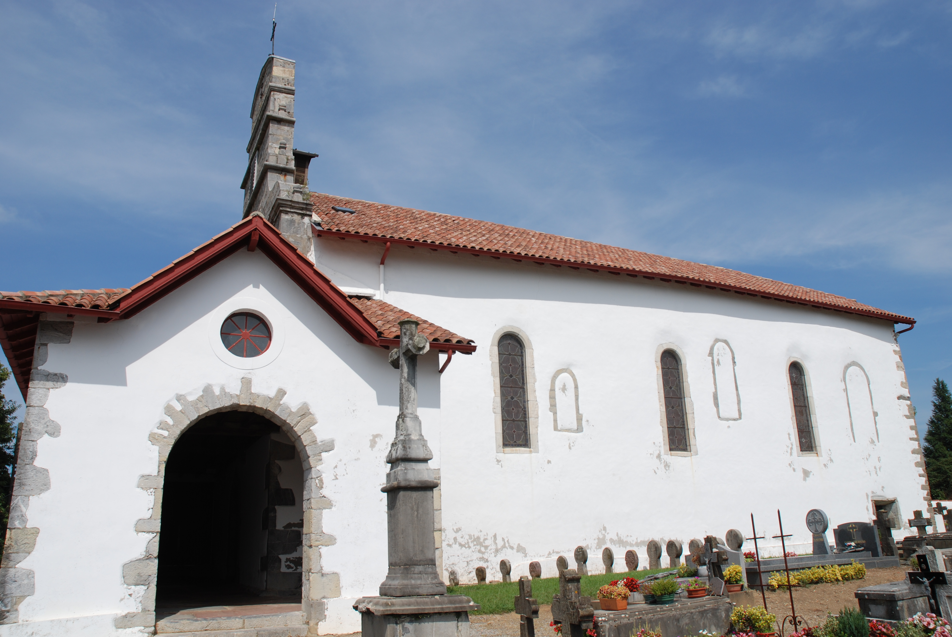 Mendionde, quatier Gréciette, l'église.